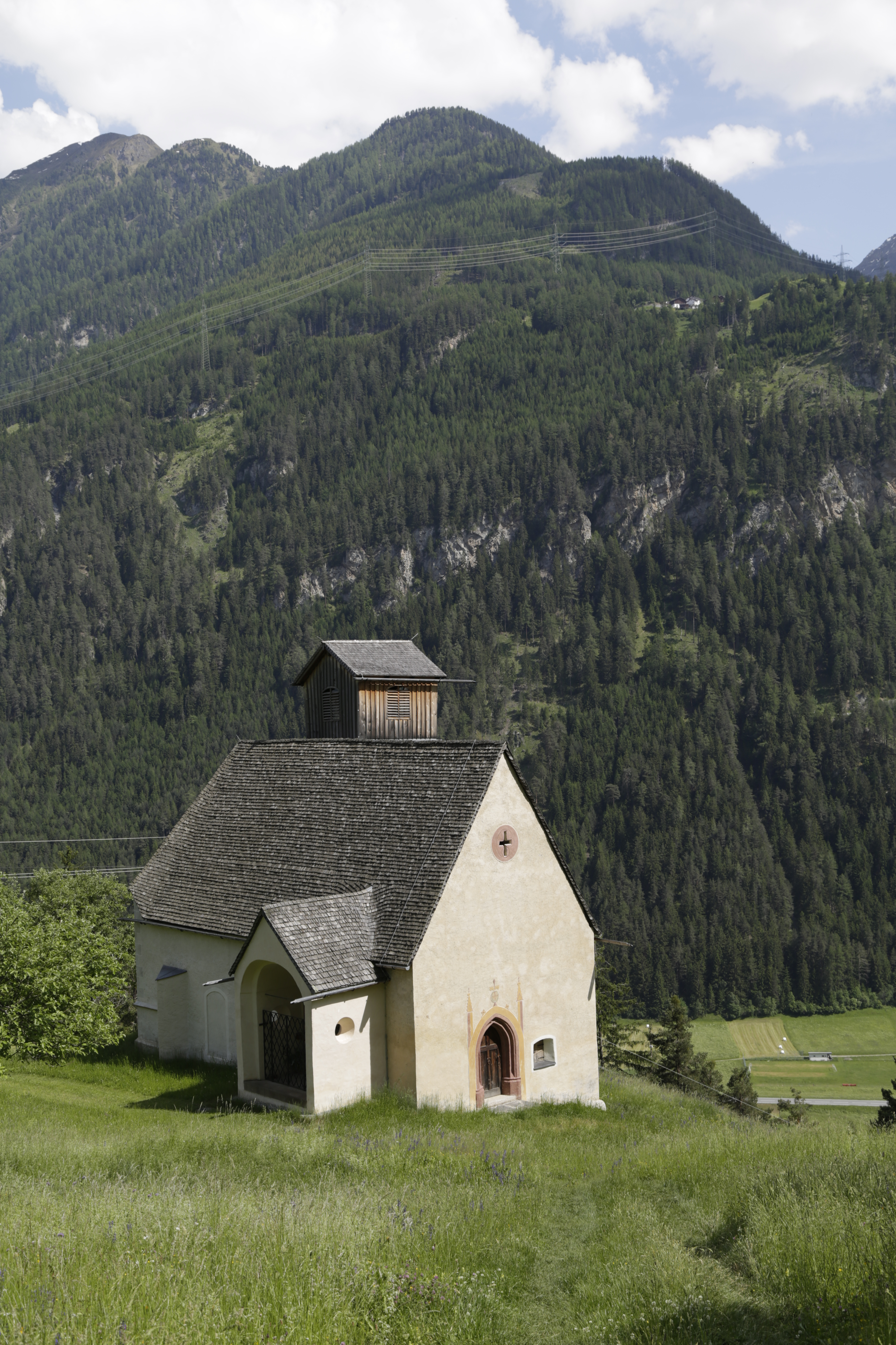 Die katholische Filialkirche des Heiligen Georg ob Tösens, befindet sich in der Gemeinde Serfaus, und ist denkmalgeschützt.